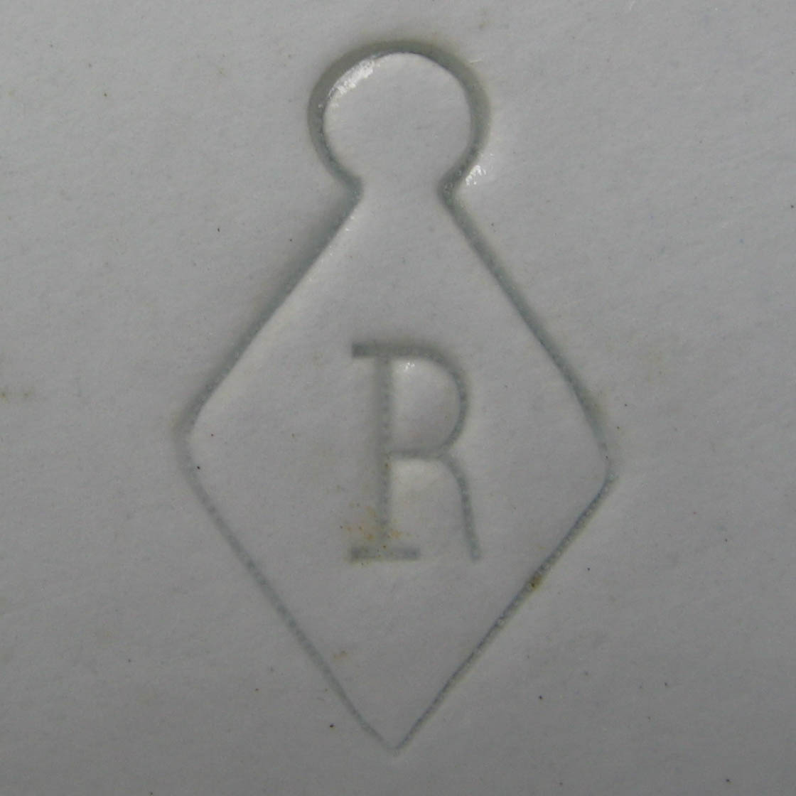 Polling 10b